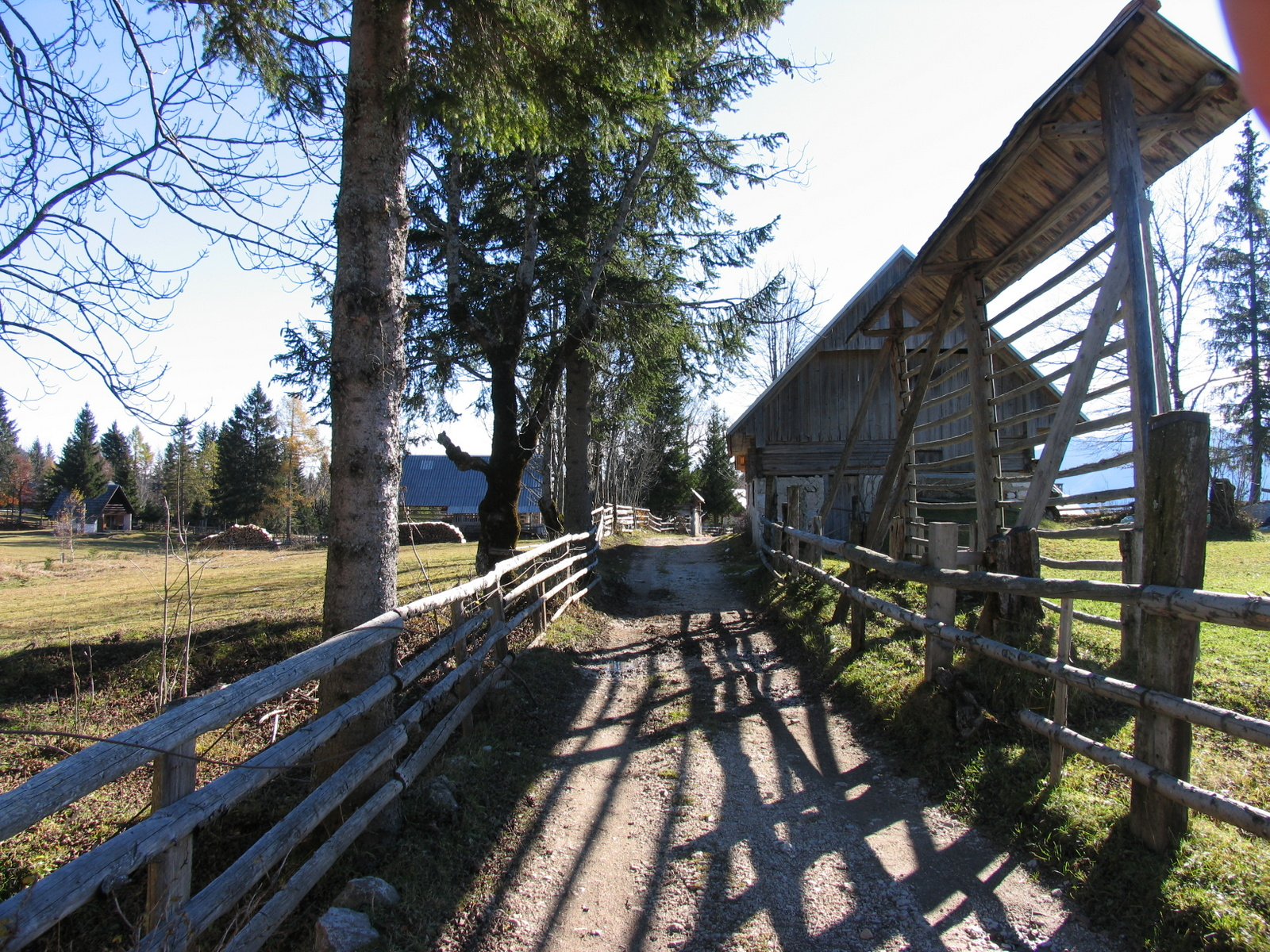 Planina Uskovnica